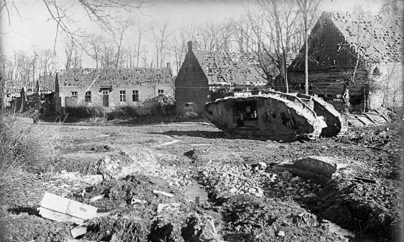 Bourlon, Tank in einer Straße, Februar 1918